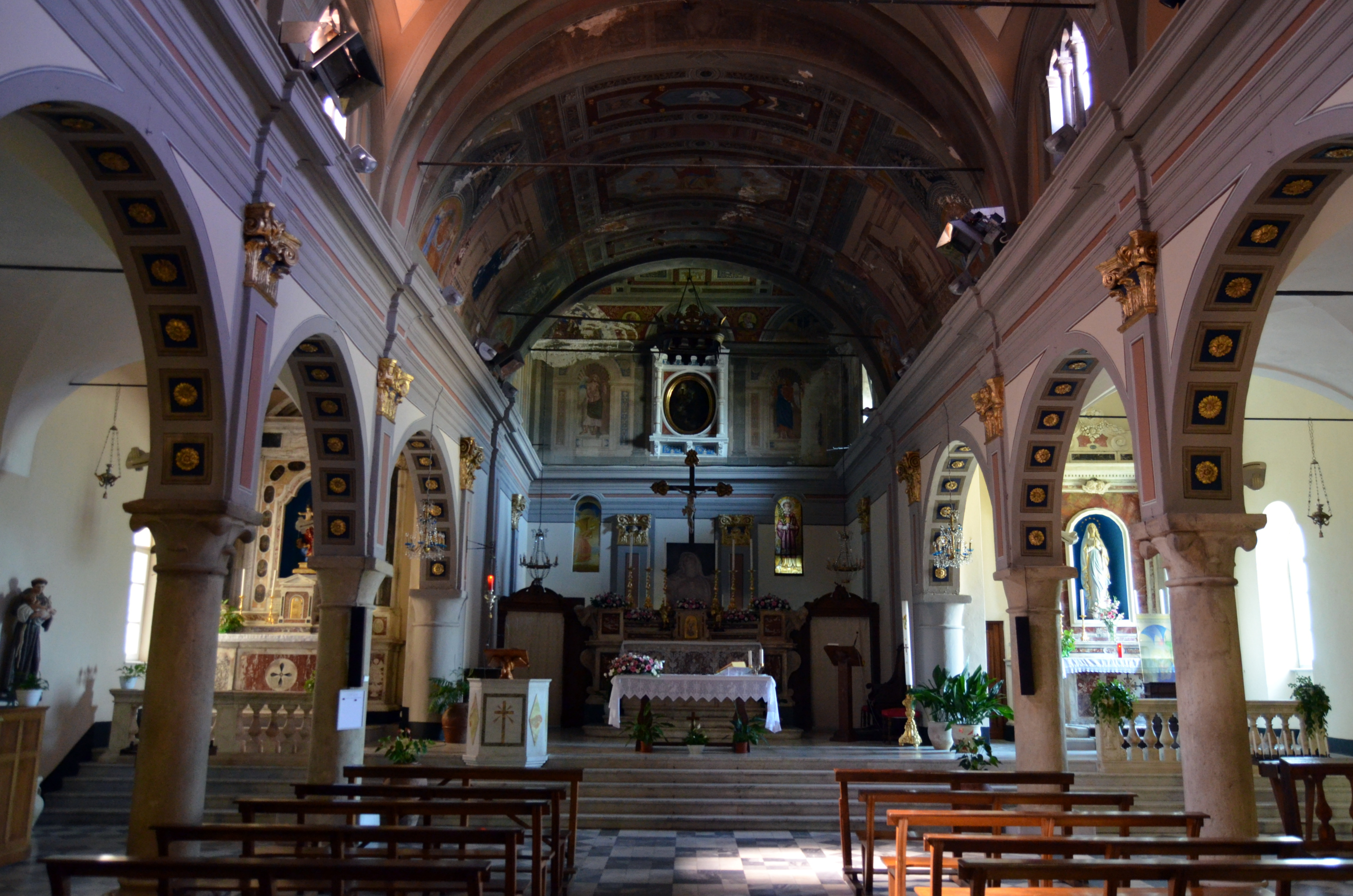 La navata centrale della chiesa di San Vincenzo, Ameglia, Liguria, Italia